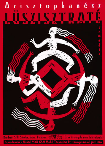 Keresztes Dóra: Plakát Arisztophanész Lüszisztraté című komédiájához (Veszprémi Petőfi Színház)